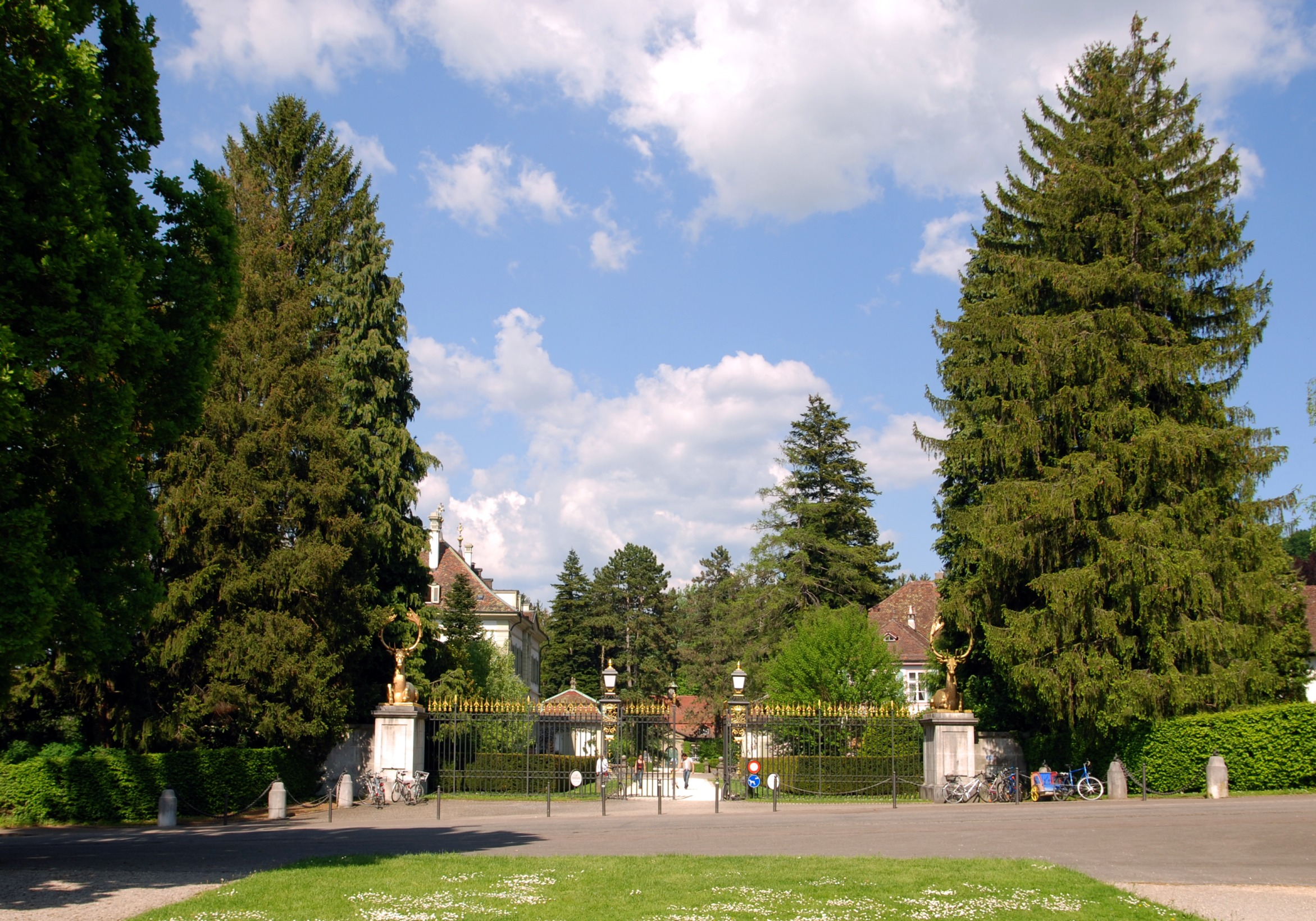 Eingangsportal des Wenkenparks